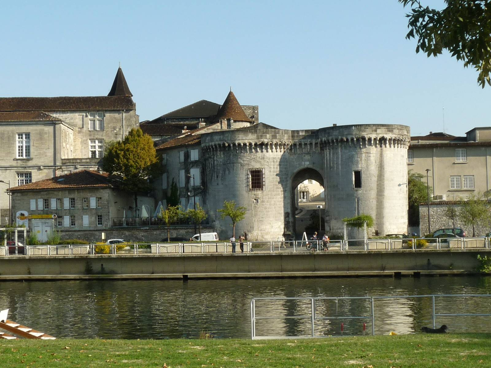 porte St-Jacques, Cognac (16), France